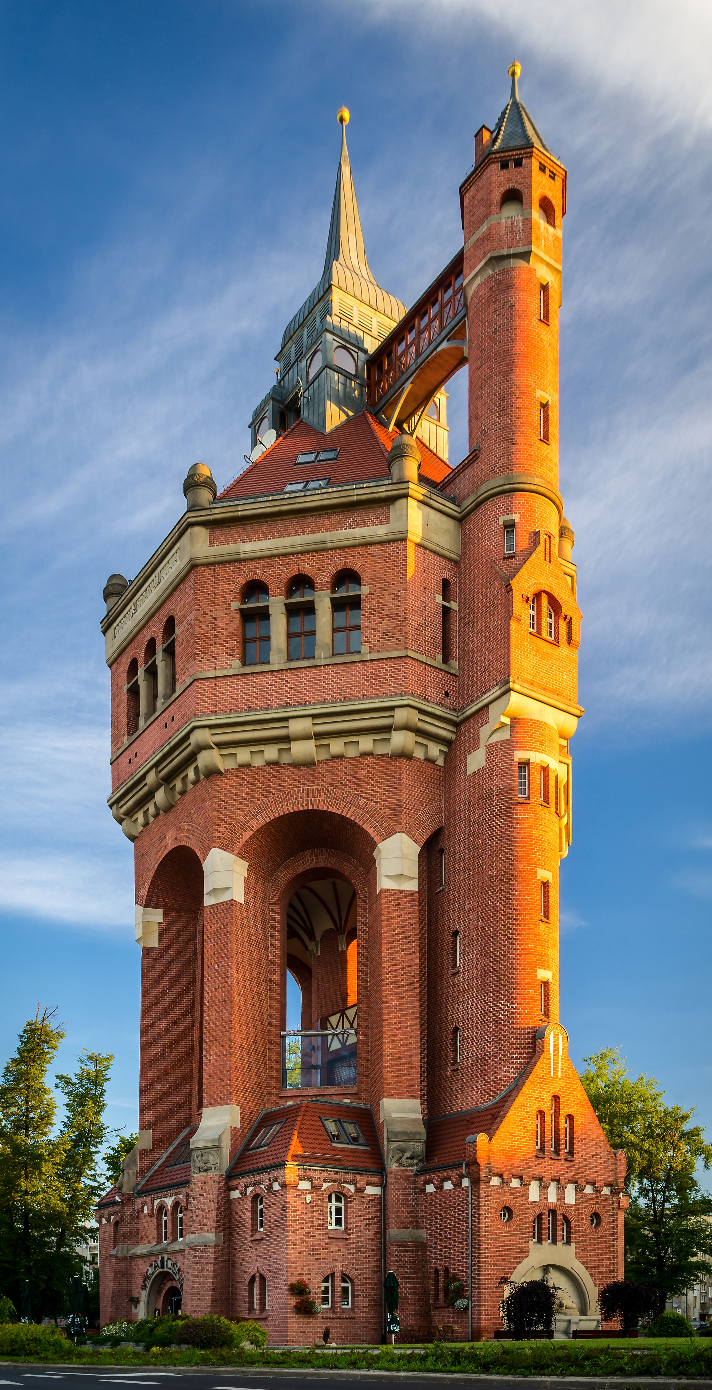 Wrocław, wodociągowa wieża wodno-widokowa, 1905